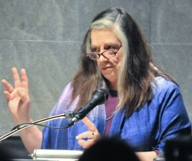 Dara Birnbaum vídeo-artista